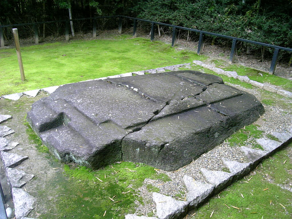 明日香村の鬼の俎